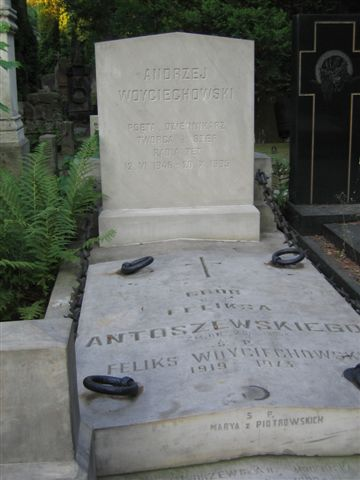 Andrzej Woyciechowski's monument (Powązki Cemetery)